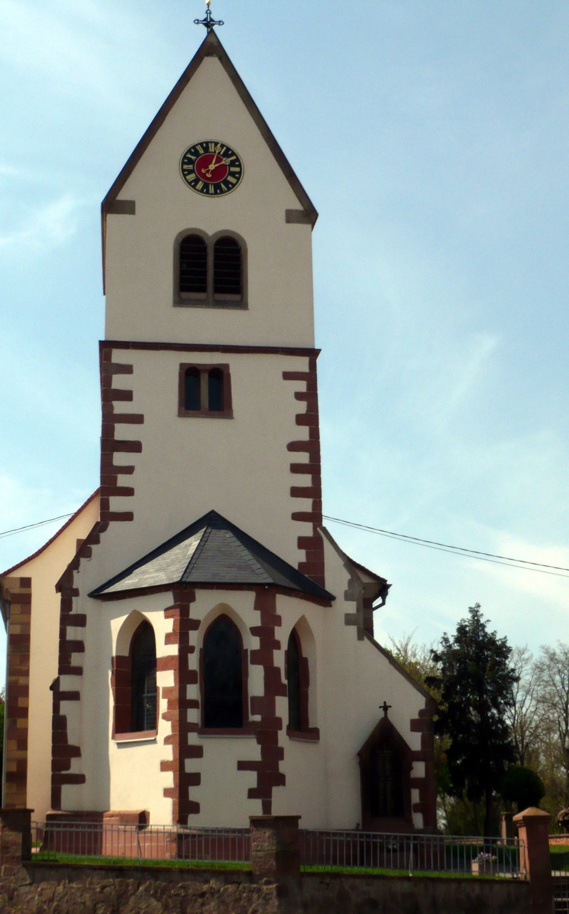 Protestantische Kirche Sankt Stephan in Waltenheim-sur-Zorn; Eglise St.-Etienne de Waltenheim-sur-Zorn; Church of Waltenheim-sur-Zorn